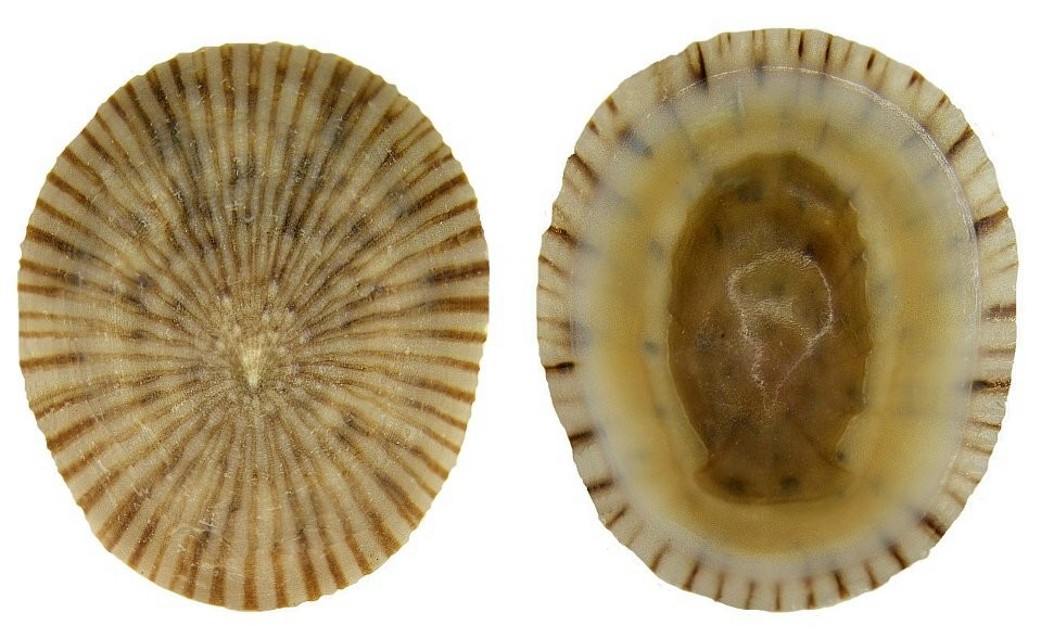 Familie: Acmaeidae Grösse: 25 mm Fundort: Dominikanische Republik, Luperon leg.det. U.Schmidt, 1989 Foto: U.Schmidt, 2008